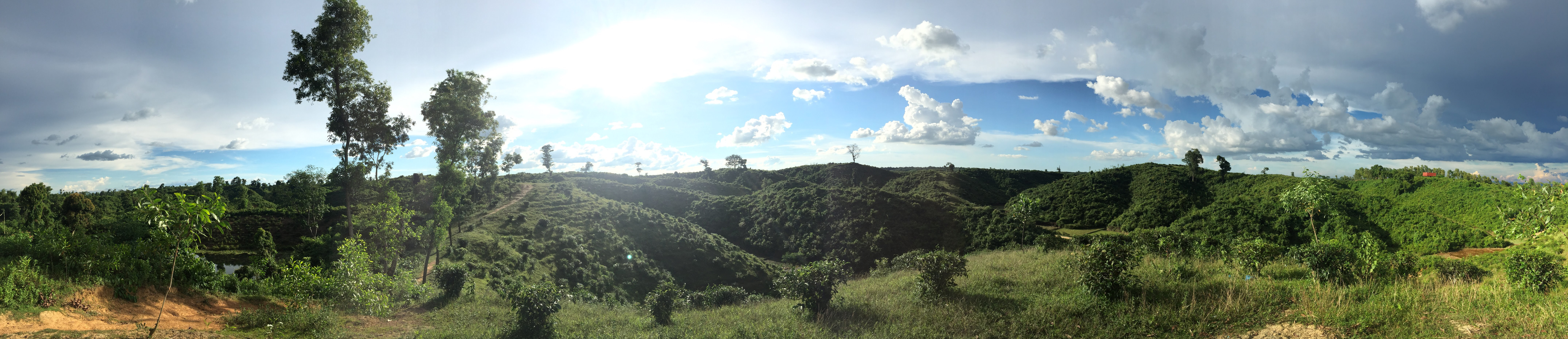 বর্ষিজোড়া ইকোপার্ক